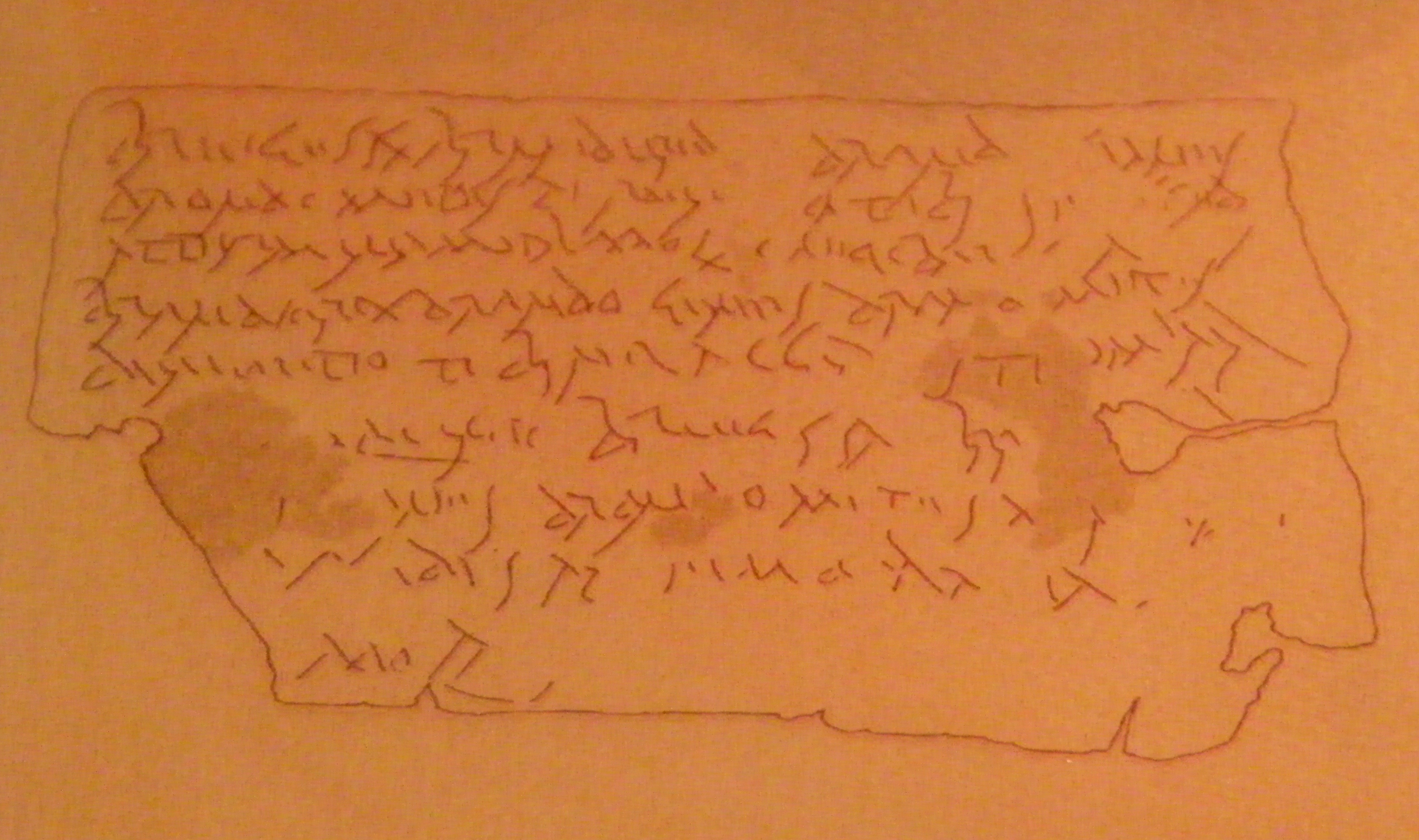 Transcription du texte d'une plaque en plomb écrite en gaulois au musée Fenaille de Rodez. Découverte à Flavin (Mas-Marcou)".